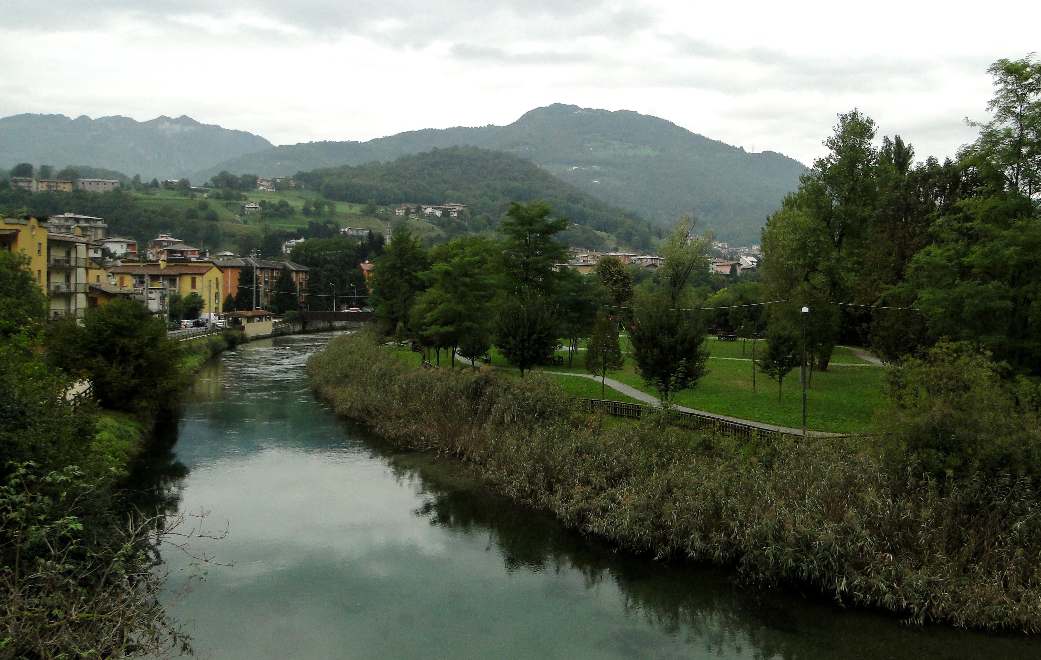 Fiorano al Serio (BG). Area Buschina lungo il fiume Serio e la pista ciclopedonale